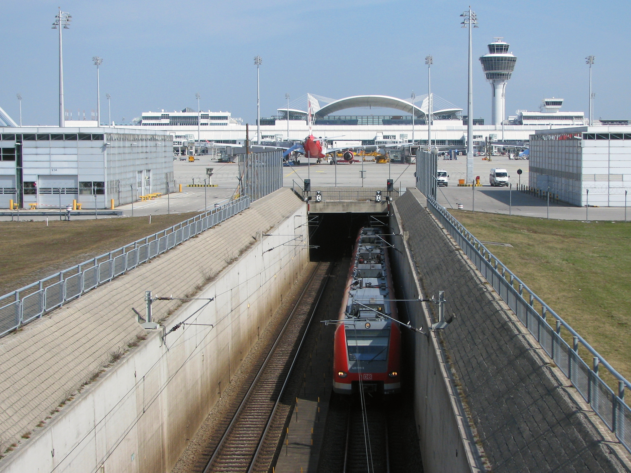 Münchener S-Bahn bei der Ausfahrt aus Bereich Terminal 1/Vorfeld am Flughafen Franz-Josef-Strauss in Erding bei München, Bayern - Foto 2009 Wolfgang Pehlemann Steinberg/Ostsee IMG_1645